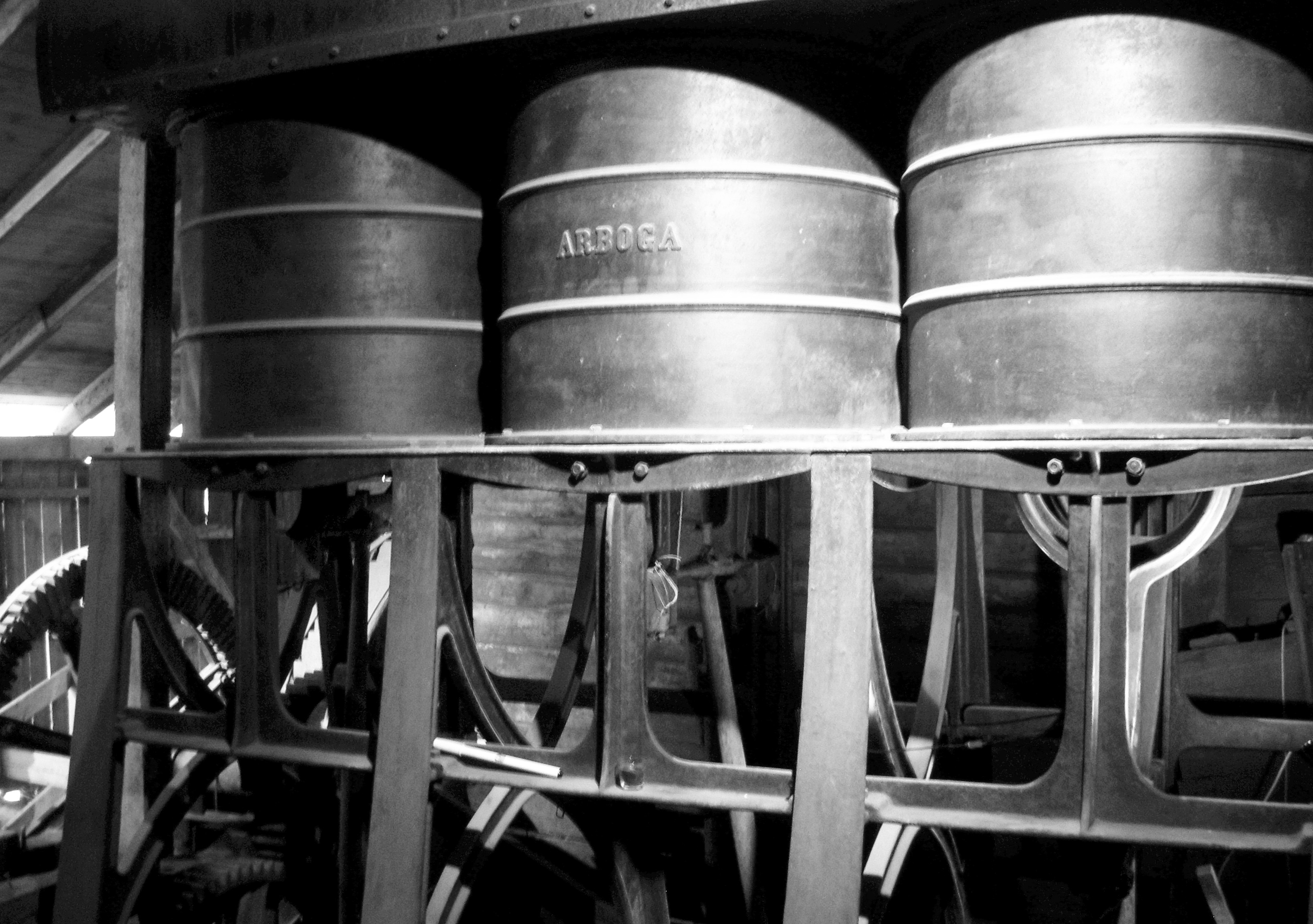 Flatenbergs hytta blåsmaskin